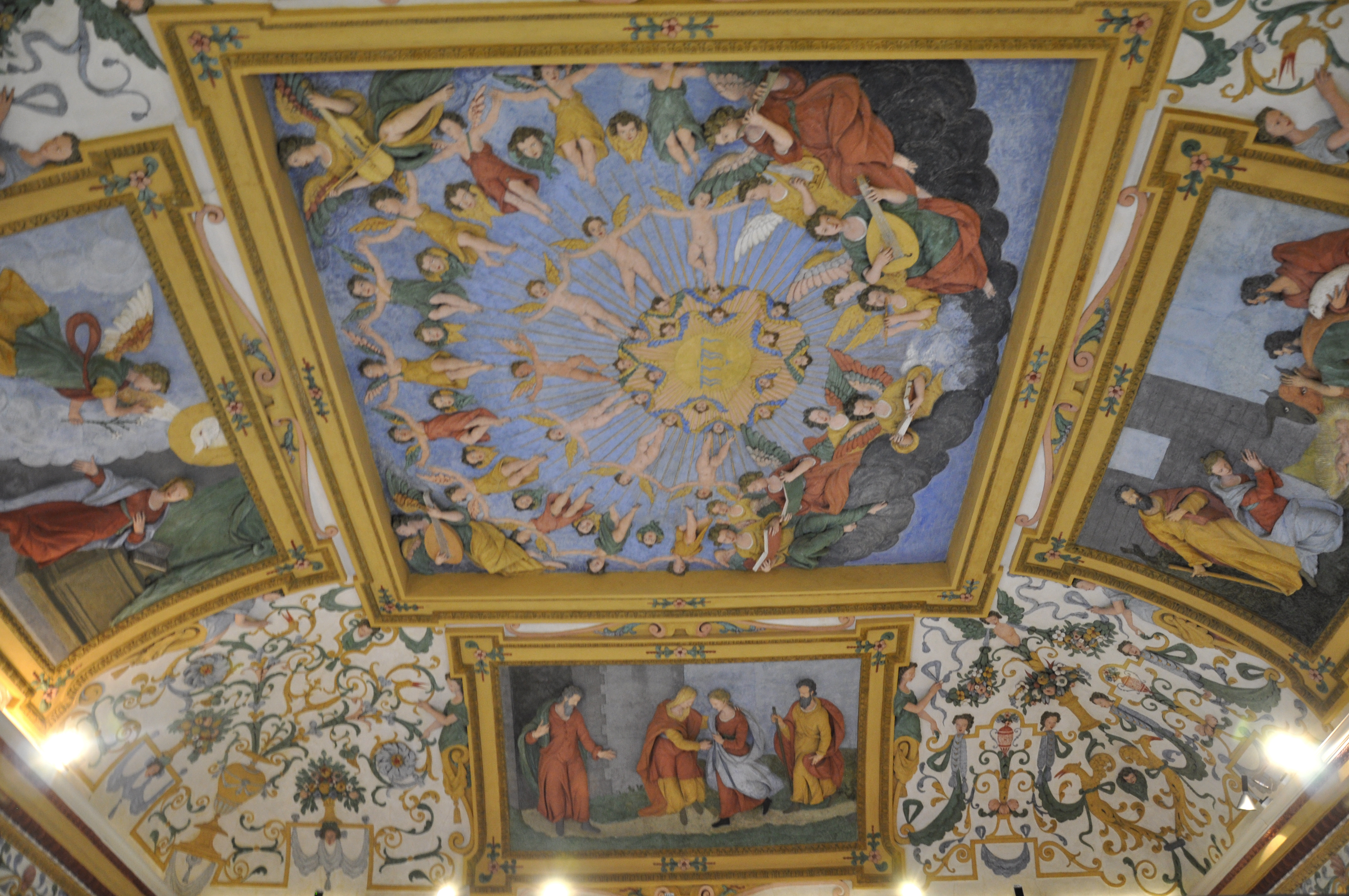 Salzburg, Neue Residenz (Salzburg Museum), Decke im Gloriensaal